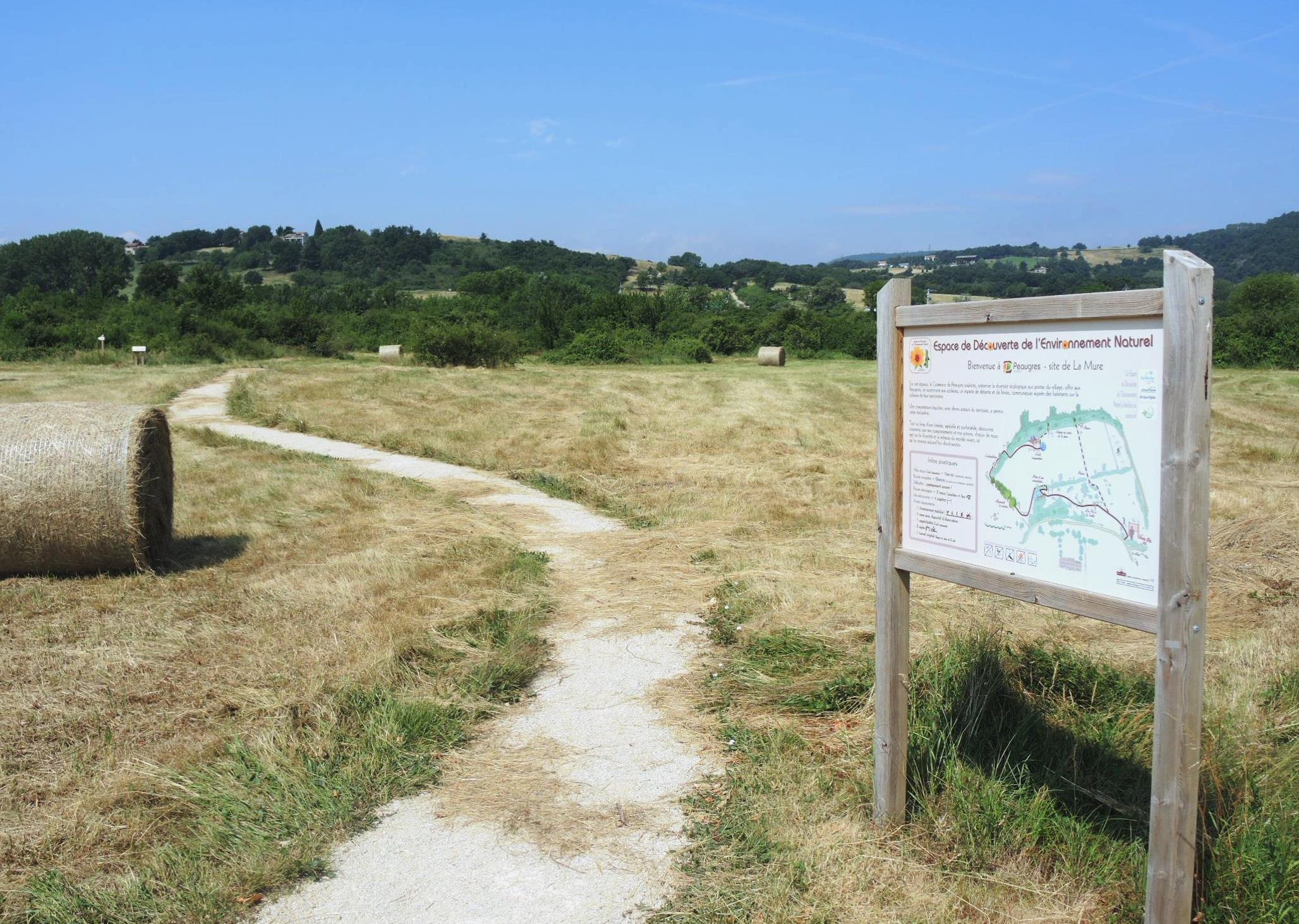 Peaugres détail